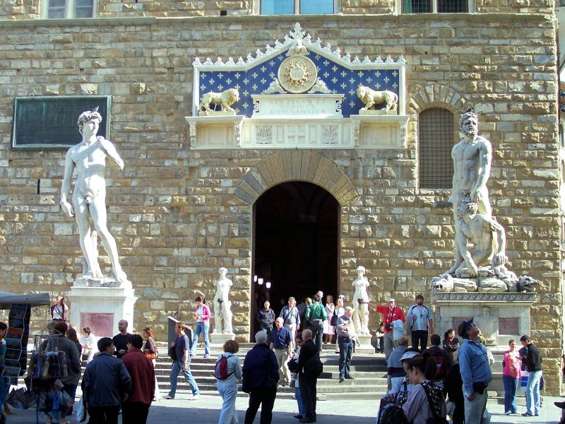 Piazza Della Signoria, Firenze, Italia